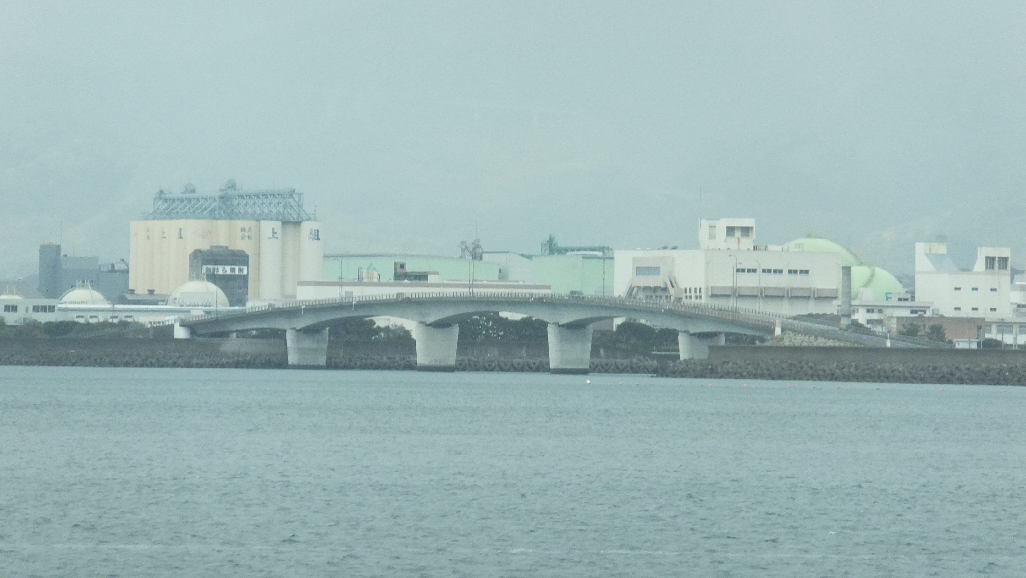 谷山臨海大橋の画像 マリンポートより撮影